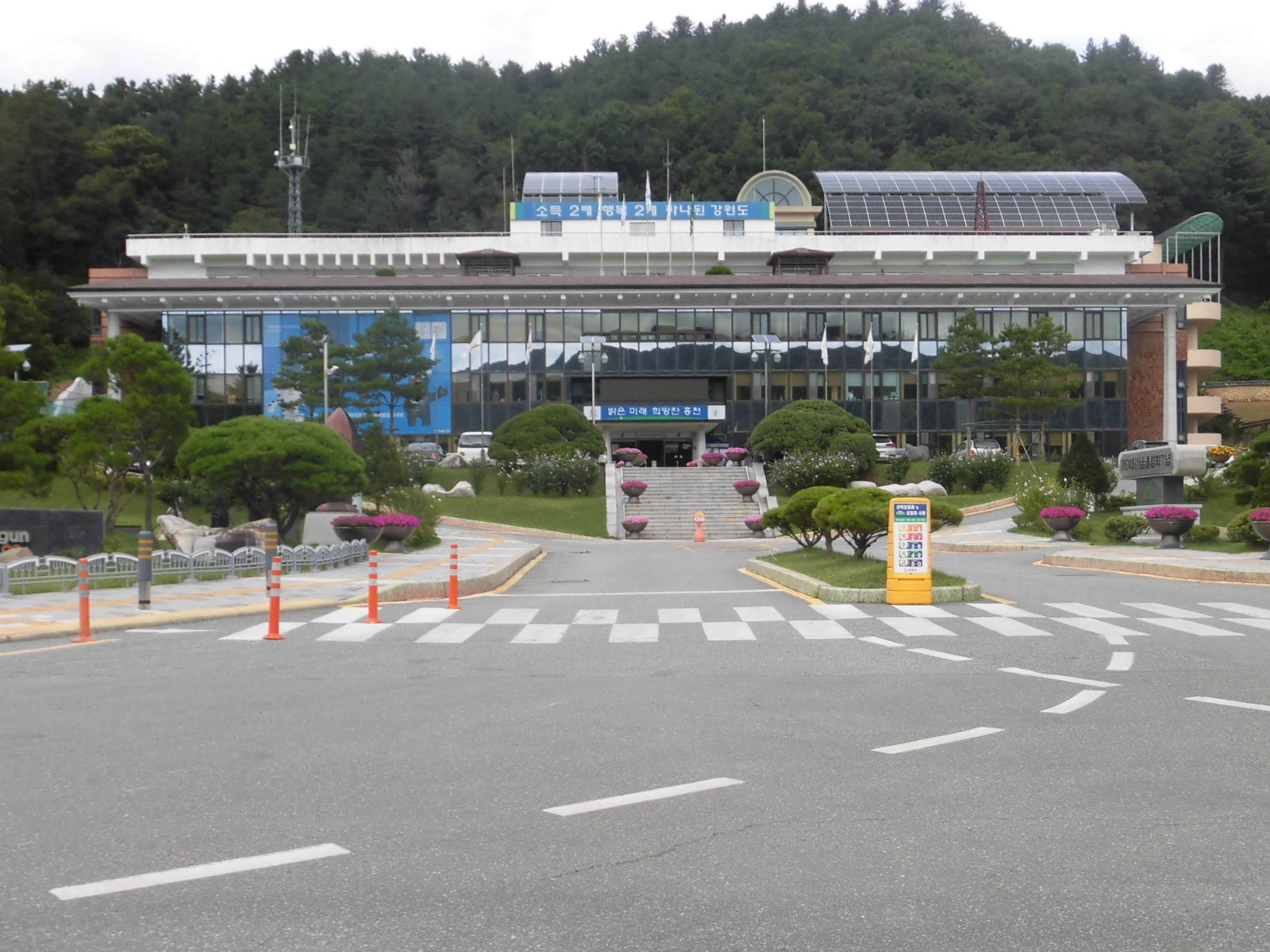 강원도 홍천군에 있는 홍천군청